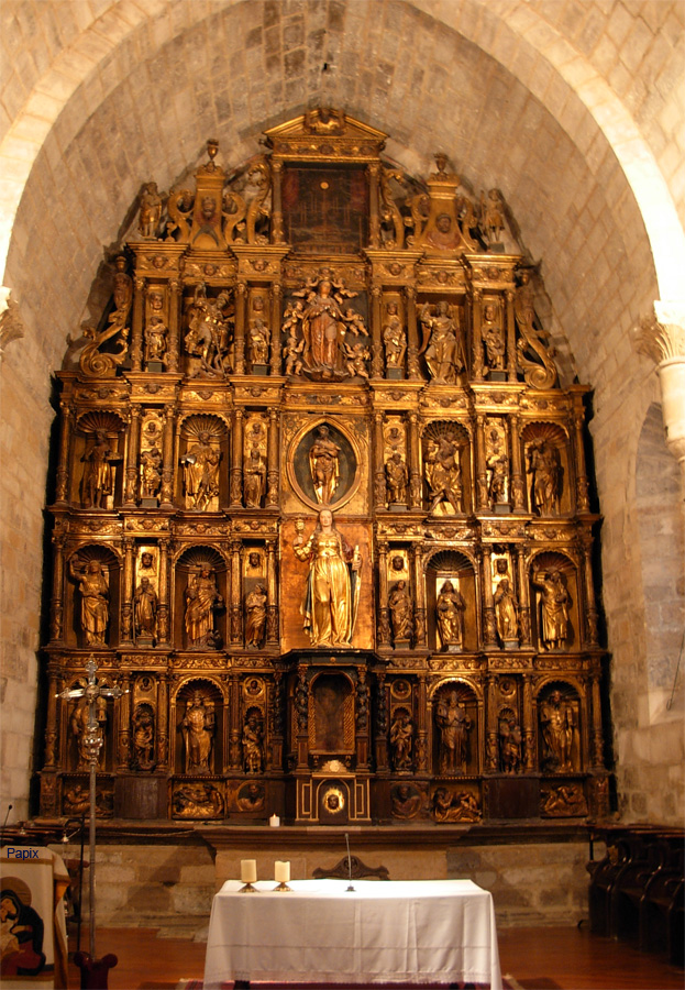 Retablo de la iglesia de la Magdalena Tudela Navarra España